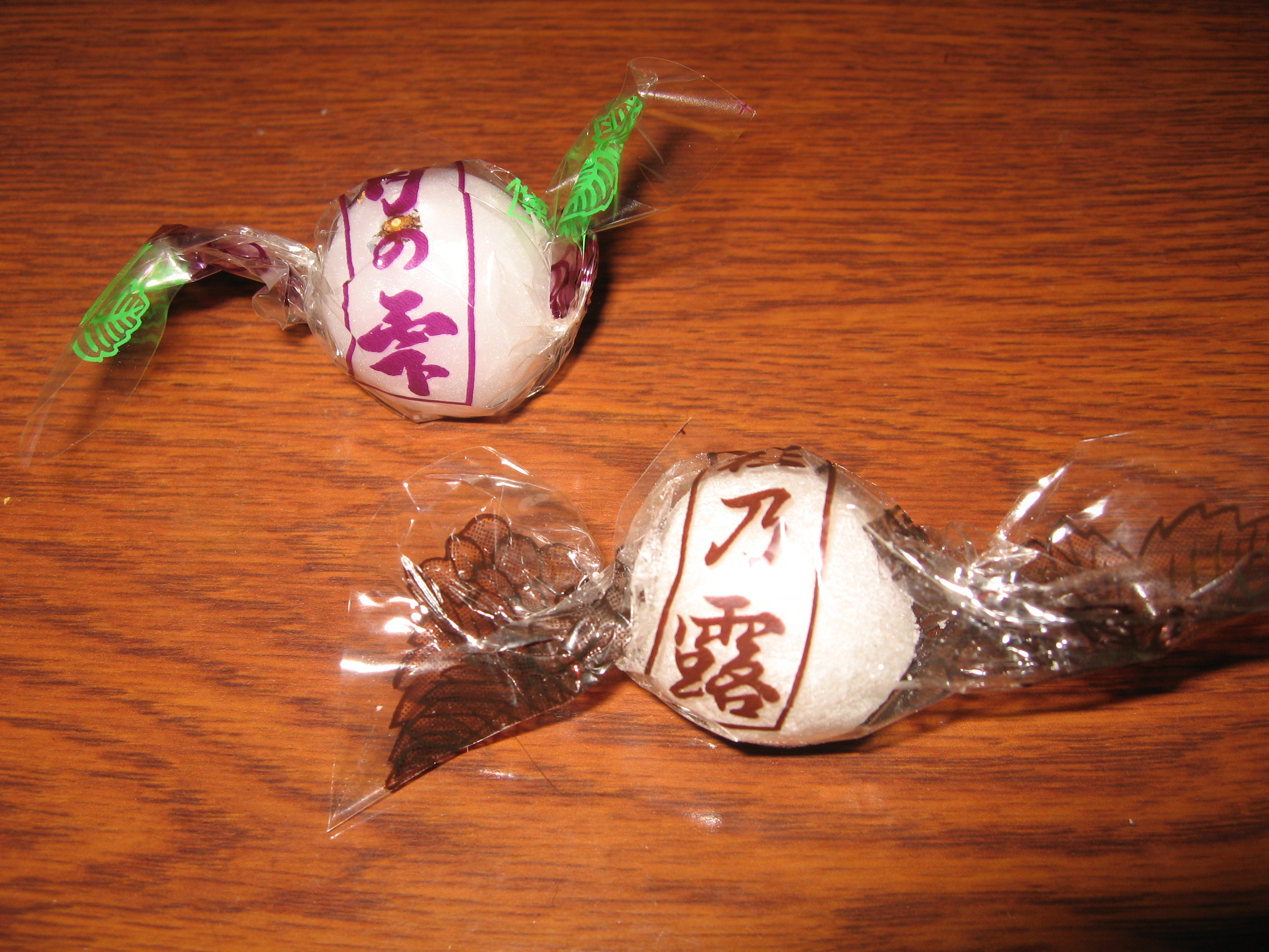 日本のボンボン月の雫(上)と桂の露(下)